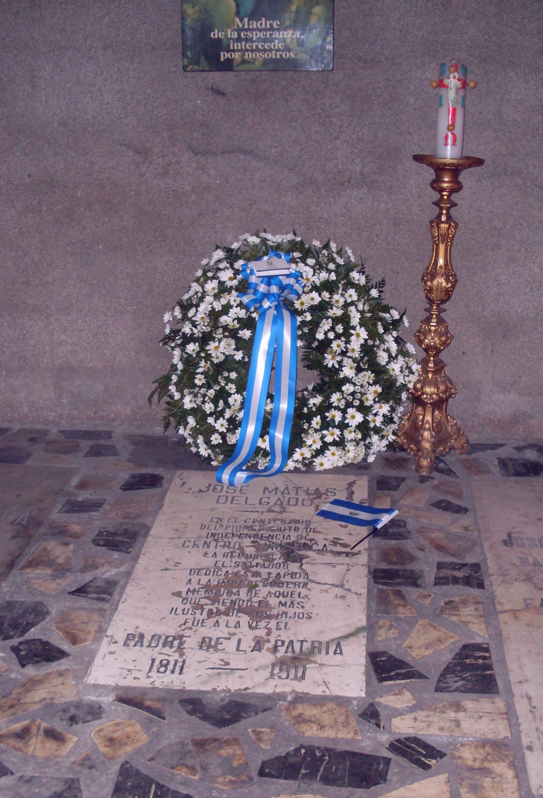 Lápida en la que se presume se encuentran los restos de José Matías Delgado en la Iglesia El Rosario de San Salvador, El Salvador.